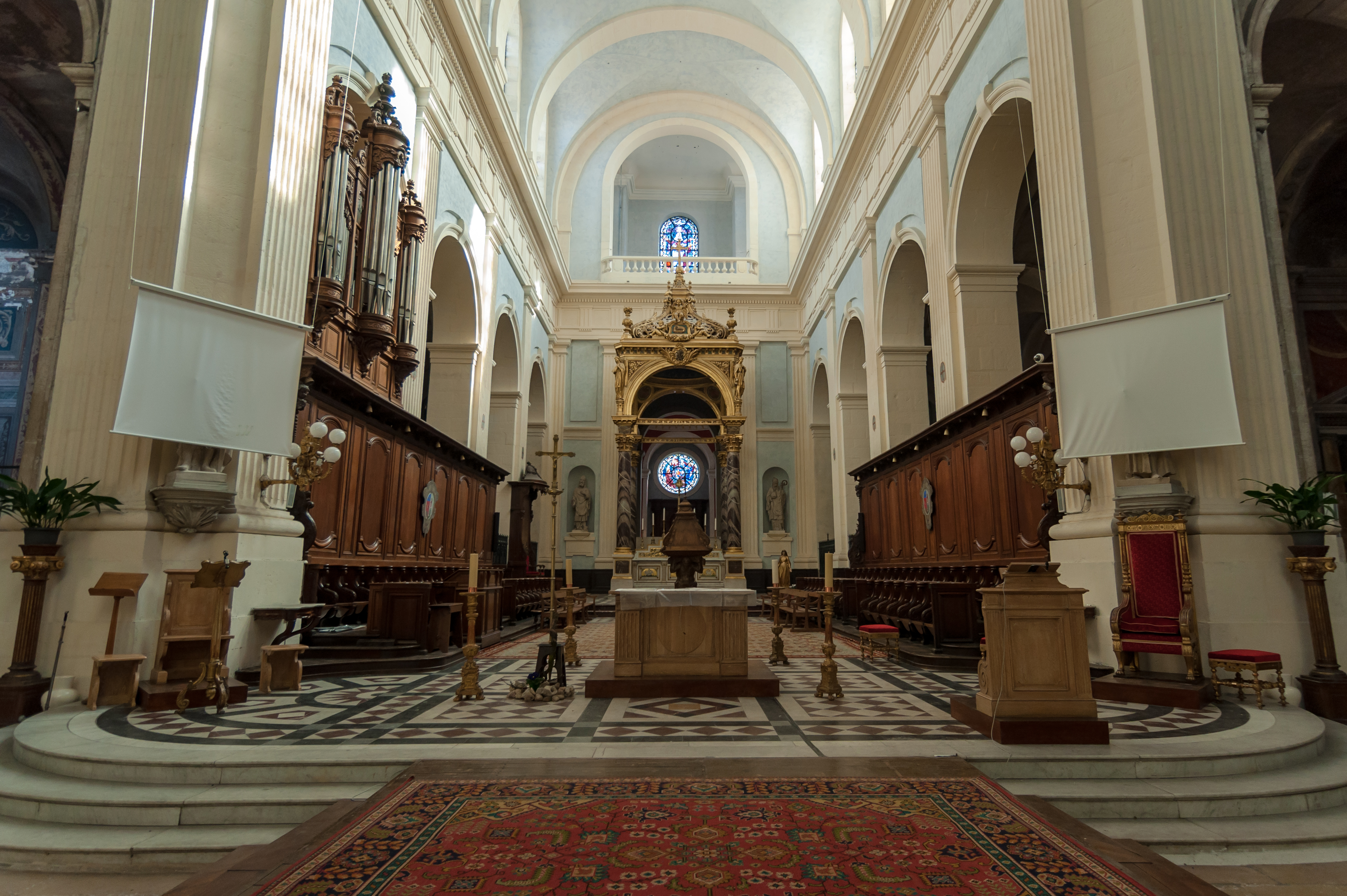 Choeur de la cathédrale de Montauban (82)